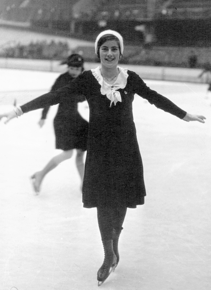 Championnat d'Europe de patinage : Mlle Joan Dix (Angleterre) : [photographie de presse] / Agence Mondial